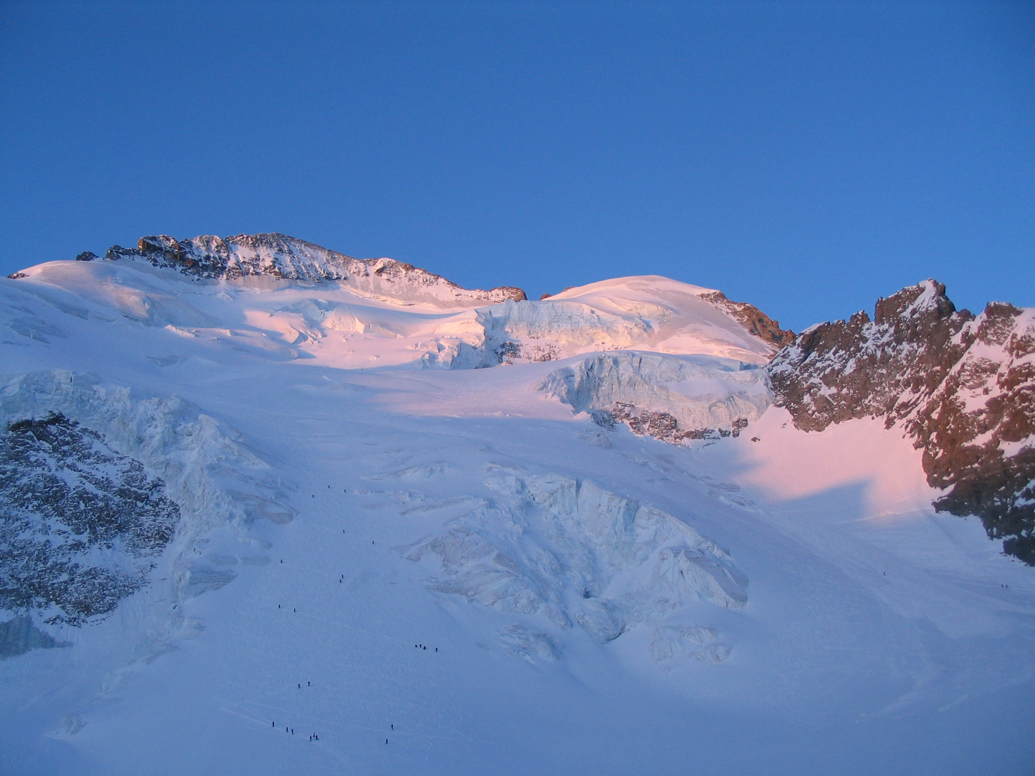 La barre et le dôme des écrins au lever du soleil (approx 6h30, 23avril 2006)